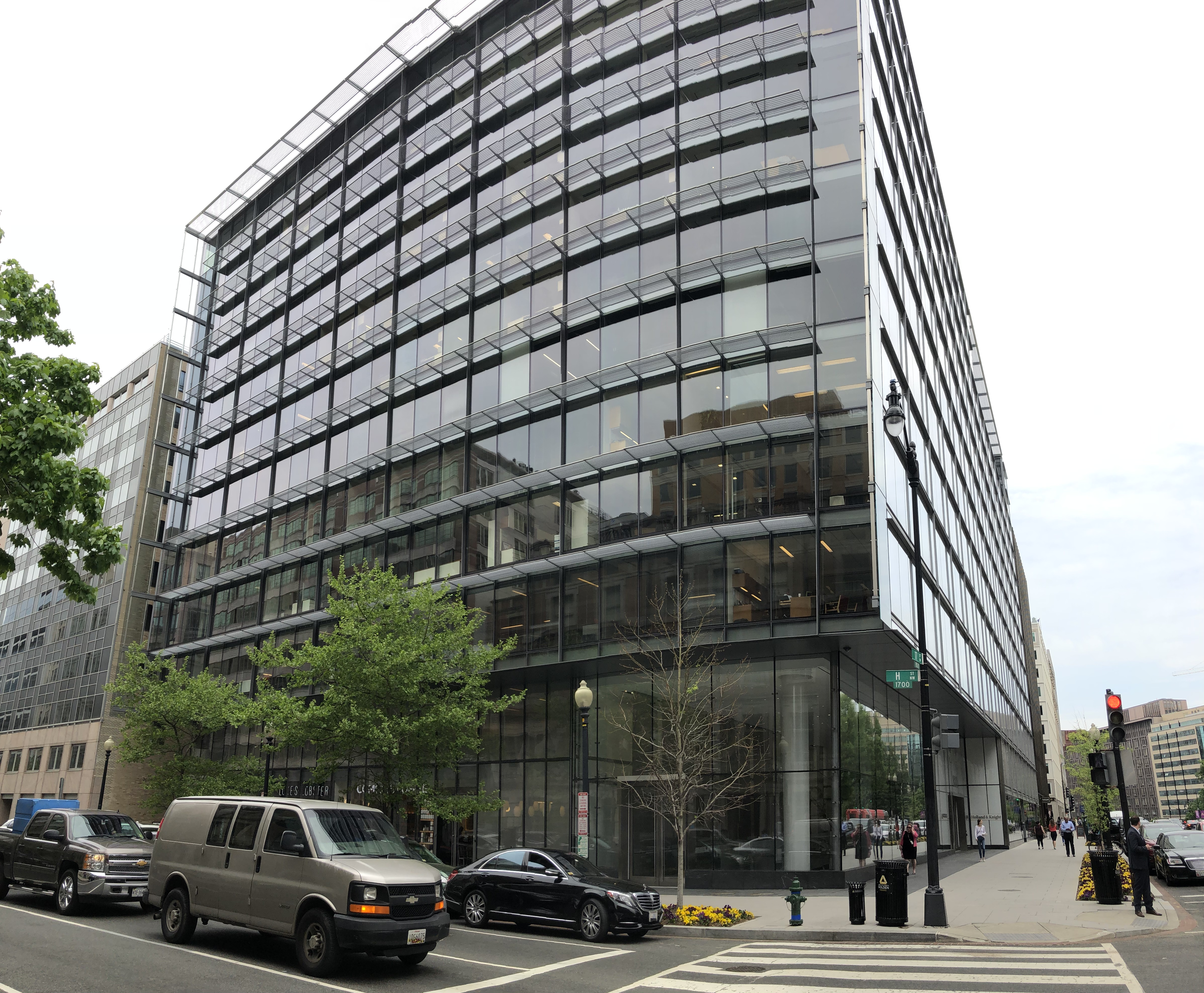 bouwwerk in Washington D.C., Verenigde Staten van Amerika